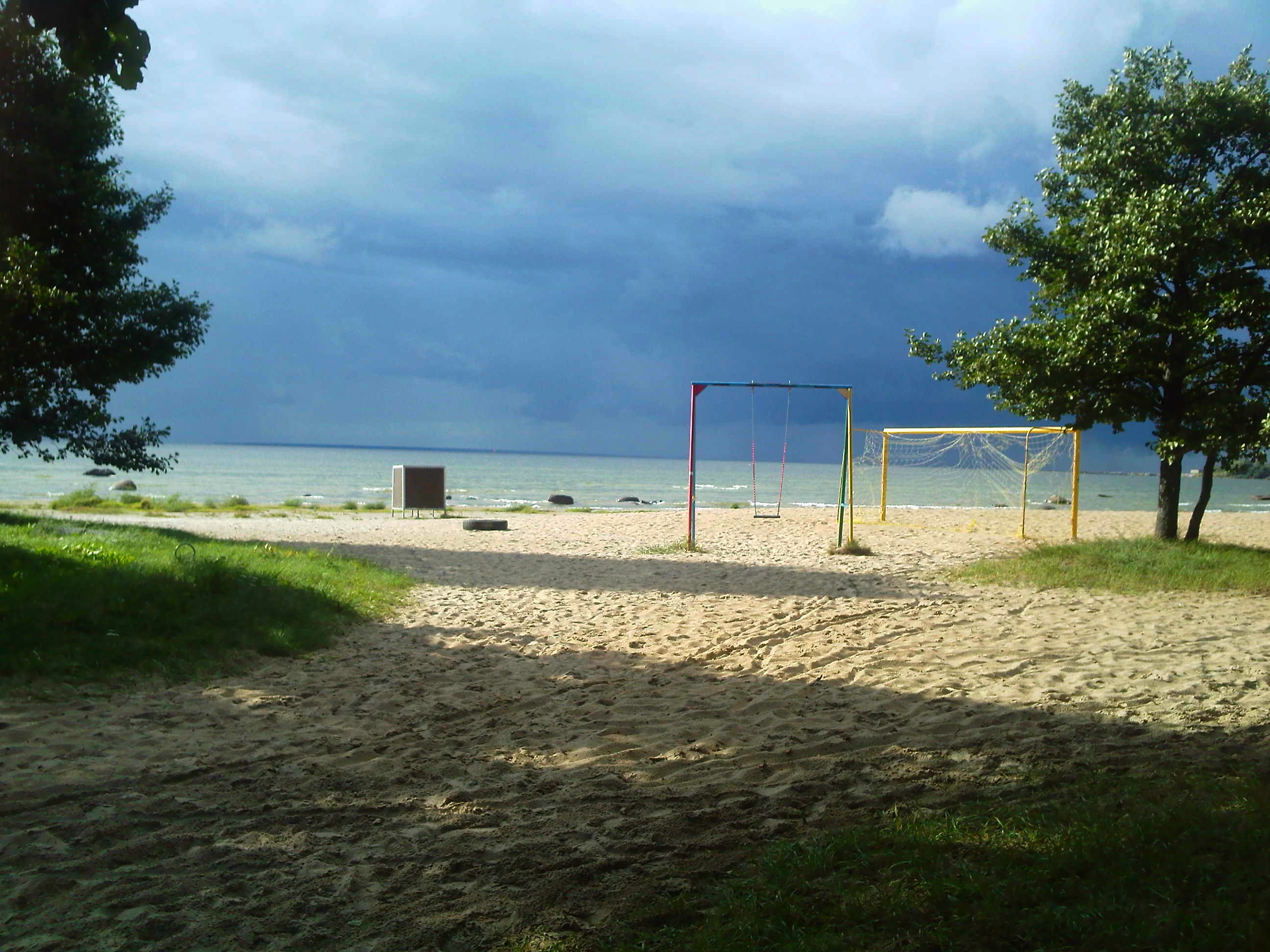 Haabneme rand enne äikest.